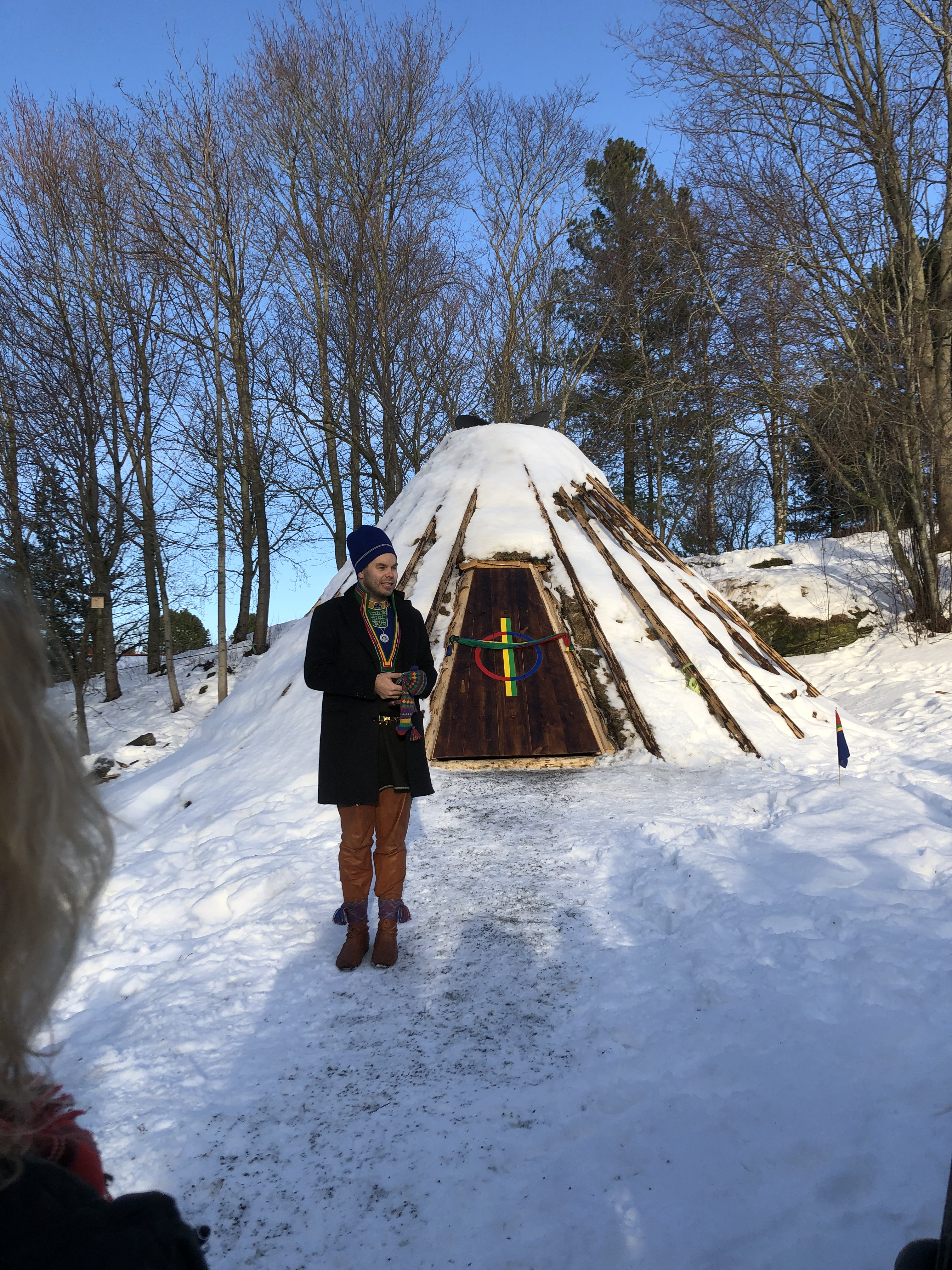 Sametingsråd Mikkel Eskil Mikkelsen taler ved innvielsen av undervisningsgamme ved NORD universitets Campus Røstad, 7. febraur 2019